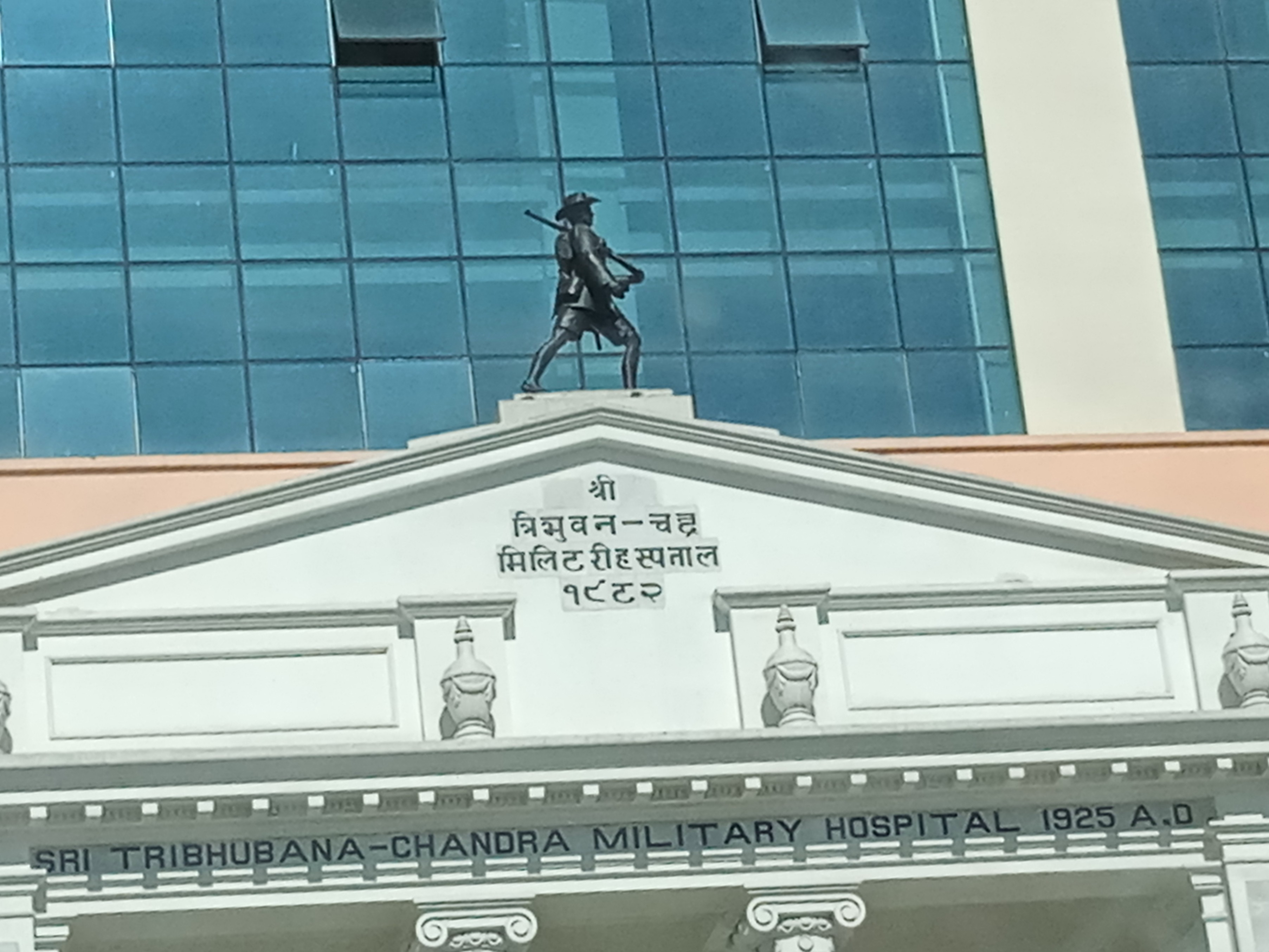 नेपाली: सैनिकको सालिक: रत्नबहादुर तुलाधर